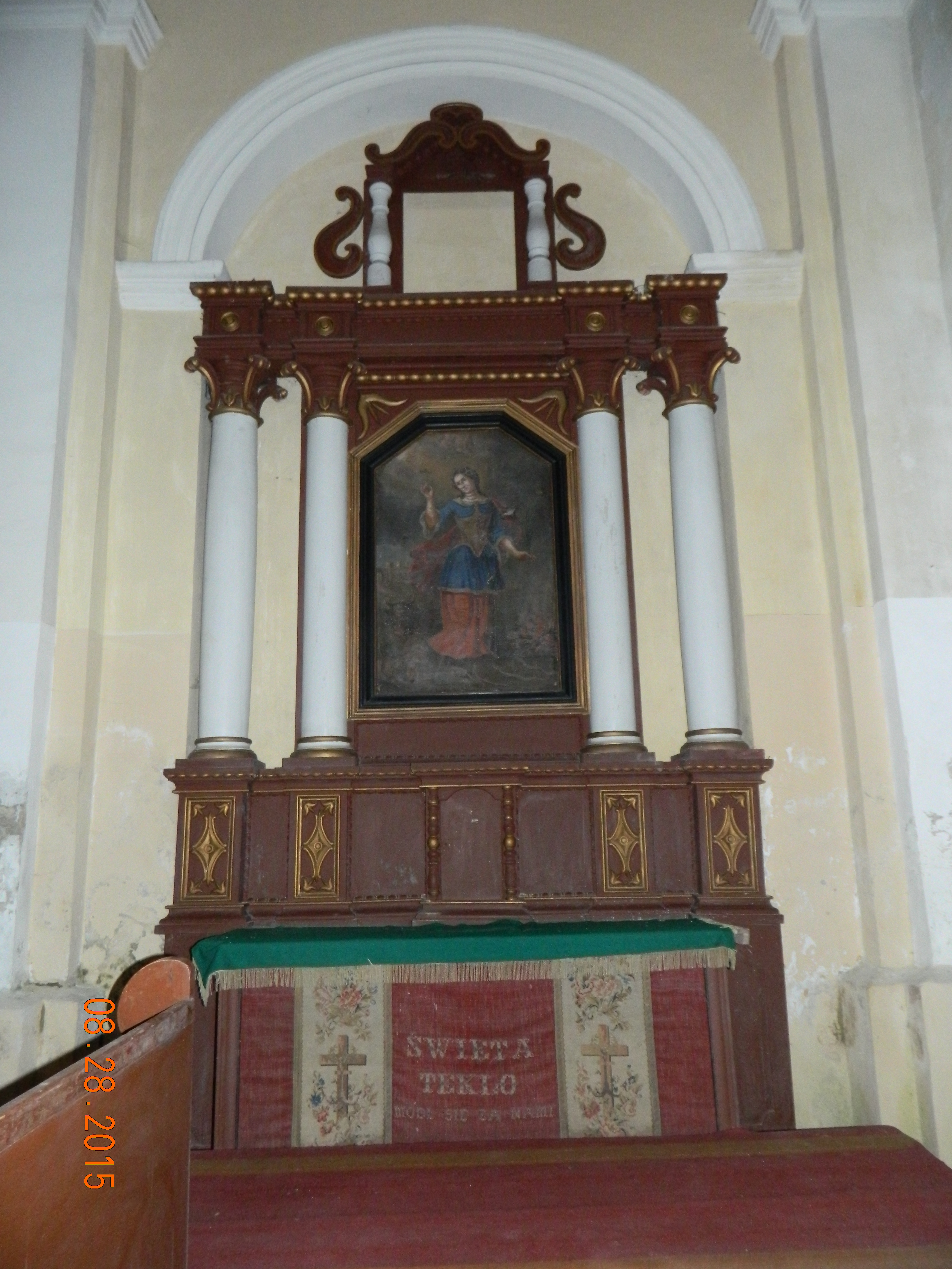 Ołtarz św. Tekli z kościoła św. Ducha w Książu Wielkim